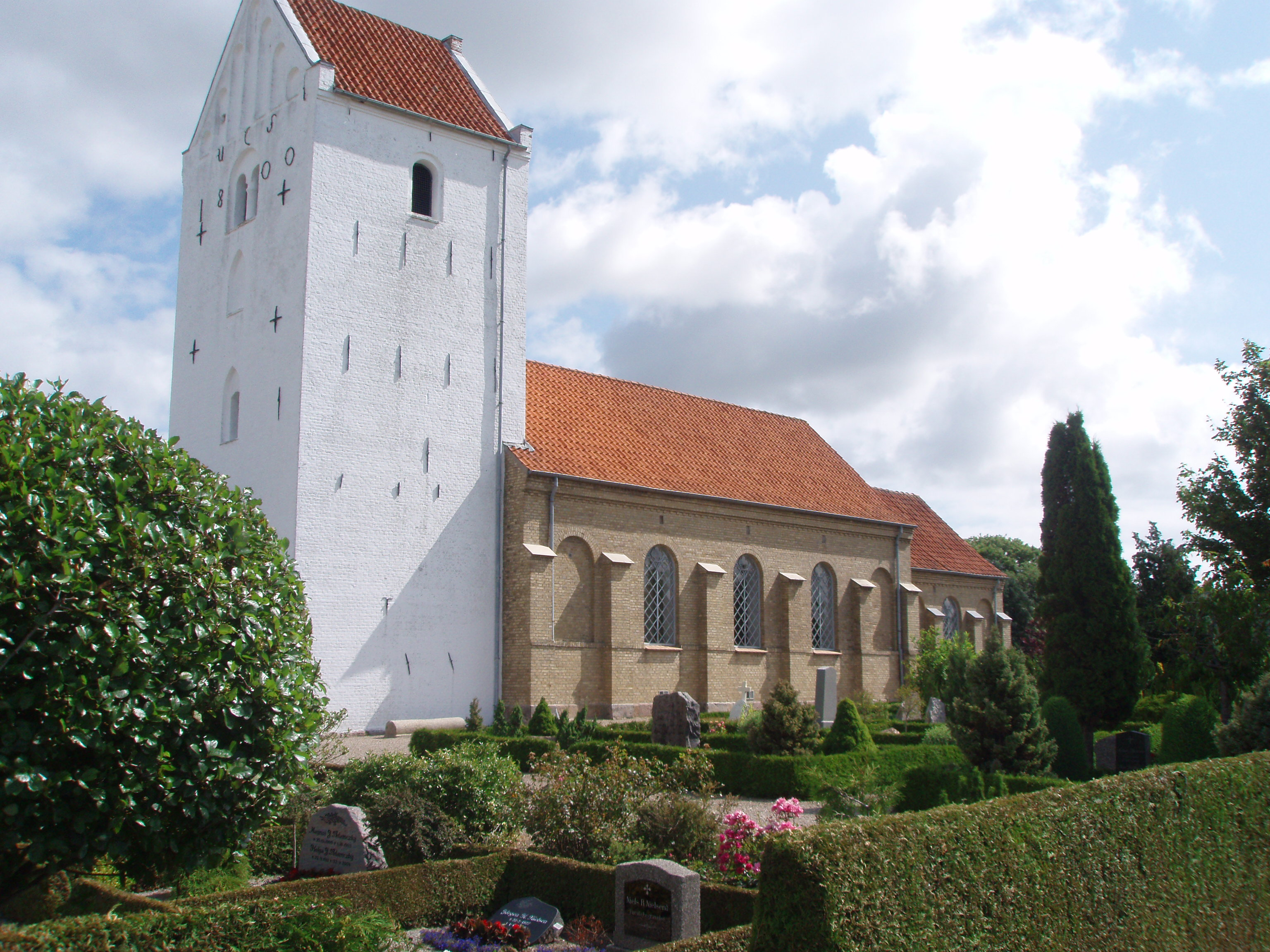 Yding Kirke, Horsens Kommune